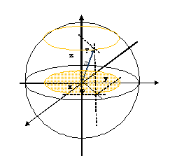 Сферне координате